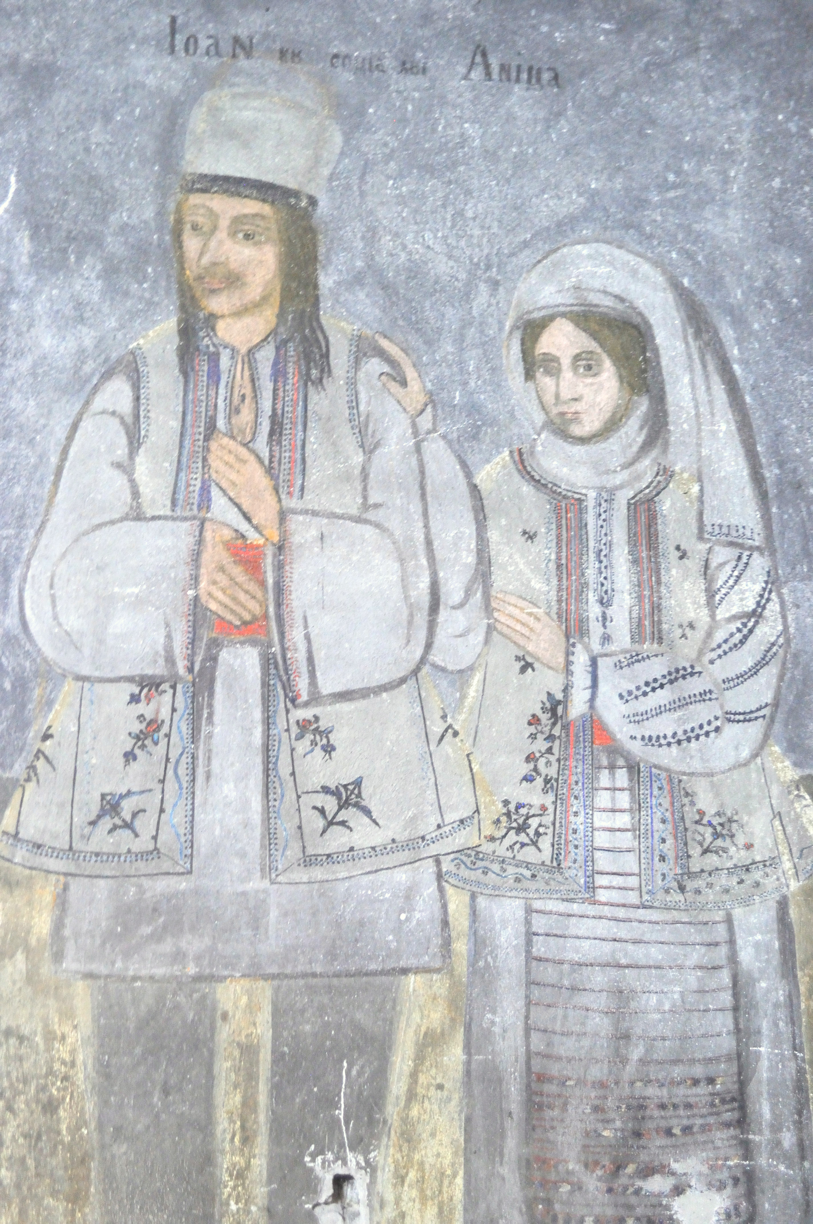 Biserica de lemn „Sfinții Voievozi” din Titerlești, județul Mehedinți